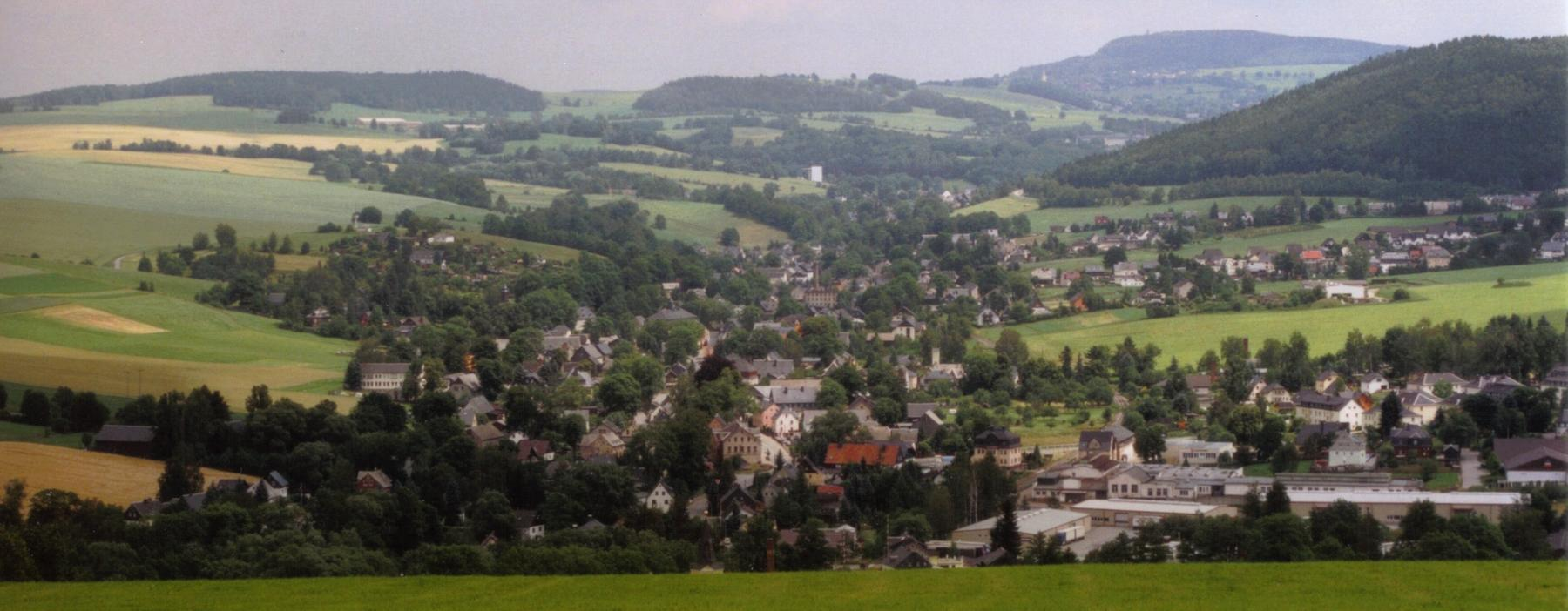 Mittweidatal aus Richtung Gruenstaedtel